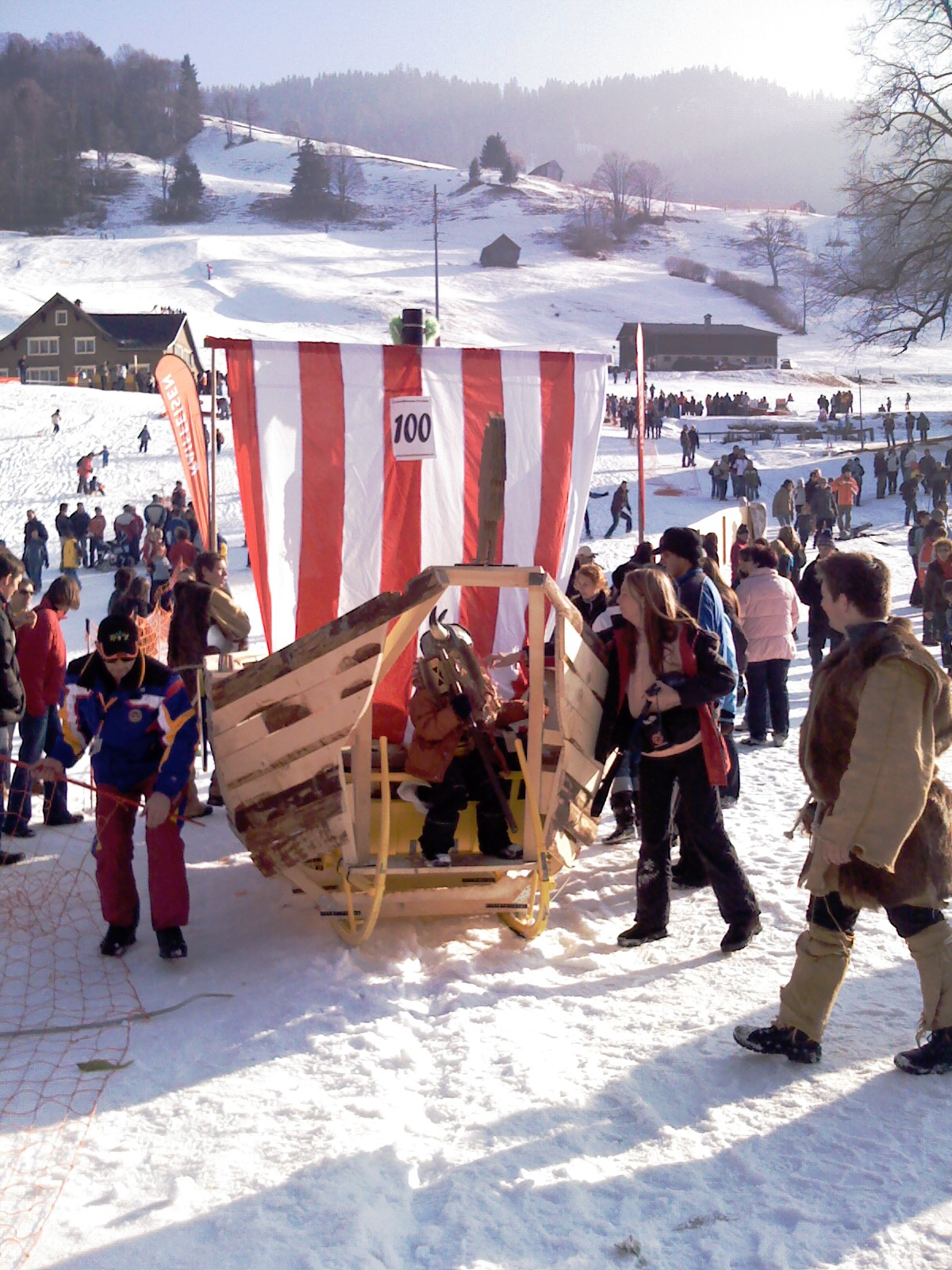 Horn sledge race at Alt St. Johann - Kornsledkonkurso Malnov-Sankt-Johano